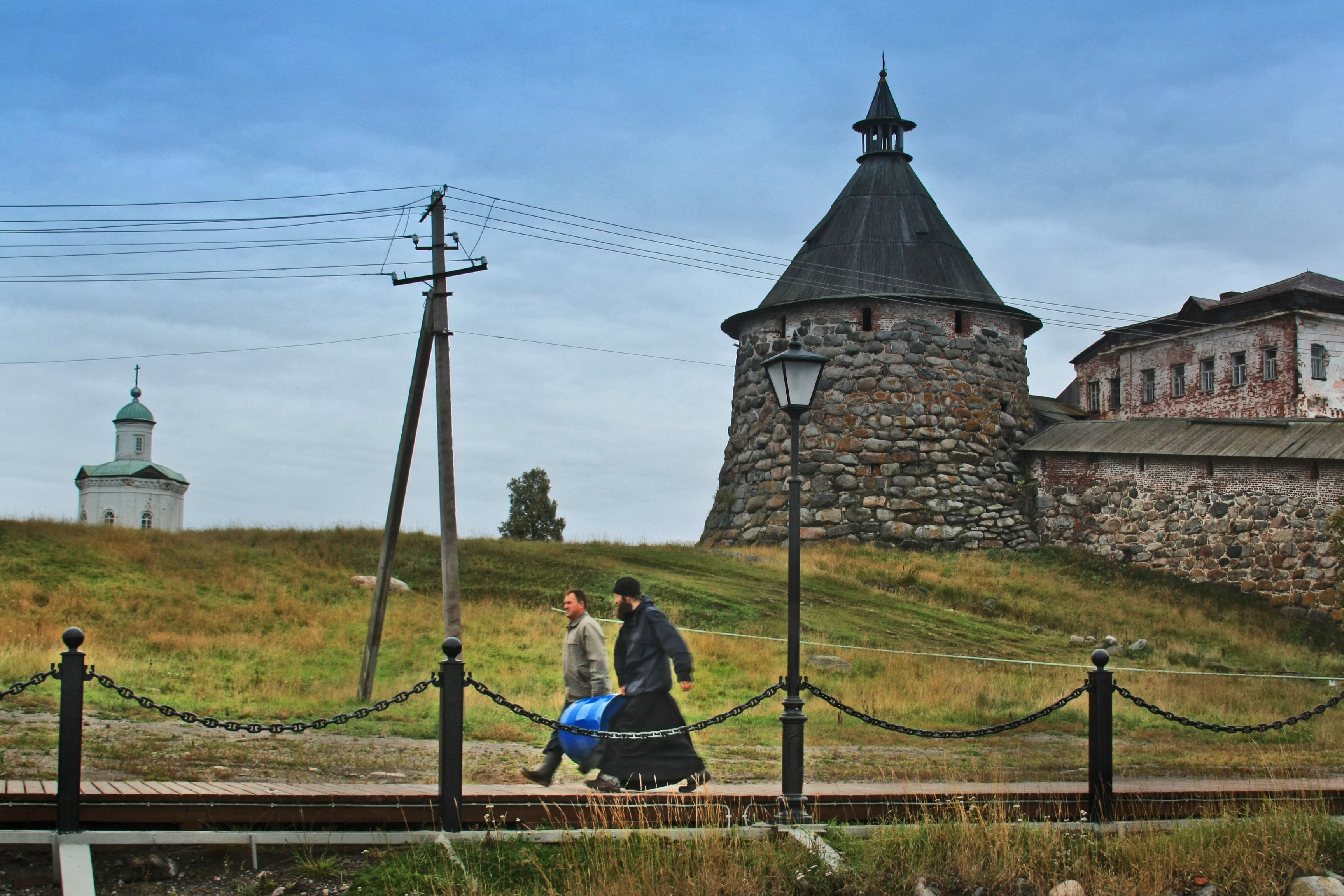 Munk ja sadamatööline kloostrilaevale kütust viimas